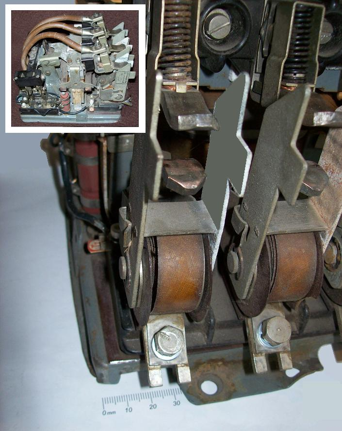 magnetische Lichtbogen-Löscheinrichtung an einem älteren Schütz: der Laststrom durchfließt eine aus einem Kupferband gefertigte Spule, die ein Magnetfeld erzeugt, das den Lichtbogen auslenkt und auf diese Weise zum Verlöschen bringt. Eingefügtes Bild: Gesamtansicht des Schütz (500 V / 50 A)